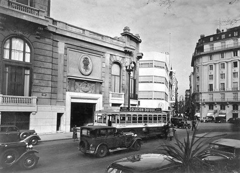 Vista del Plaza Hotel, Florida y Plaza San Martín, Buenos Aires, en 1936.